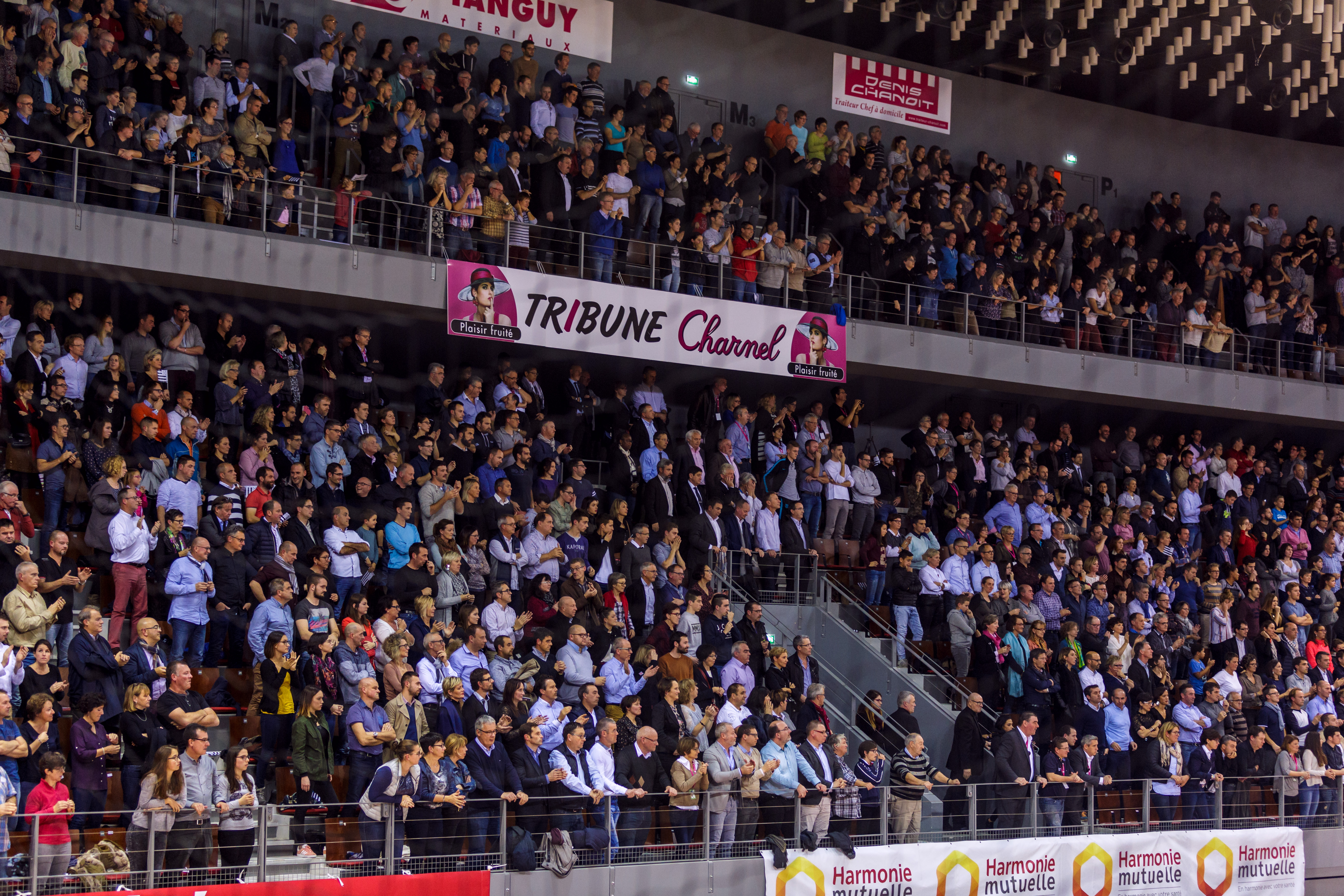 Match de handball du BREST Bretagne Handball à domicile face à Besançon (Entente Sportive Bisontine Féminin) le 16 novembre 2016. La Brest Arena a vu son club l'emporter 24-21.